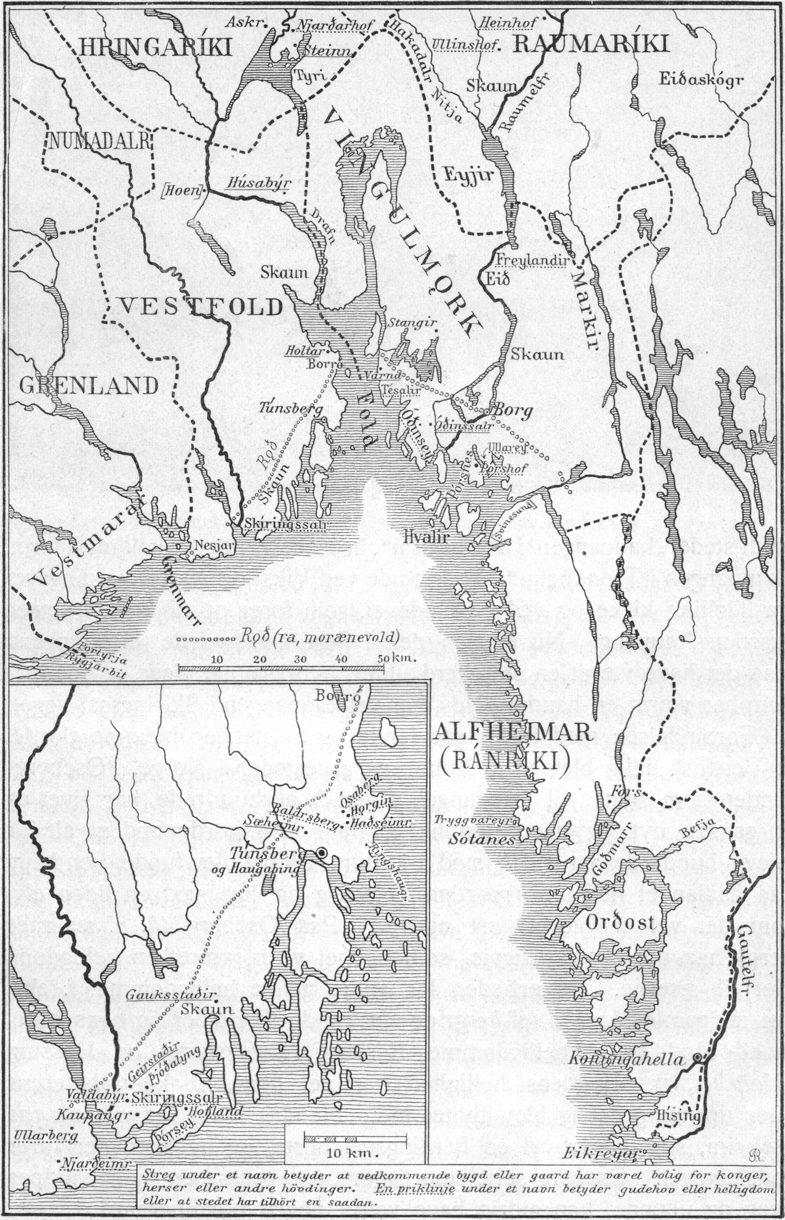 Kart over Viken i middelalderen.